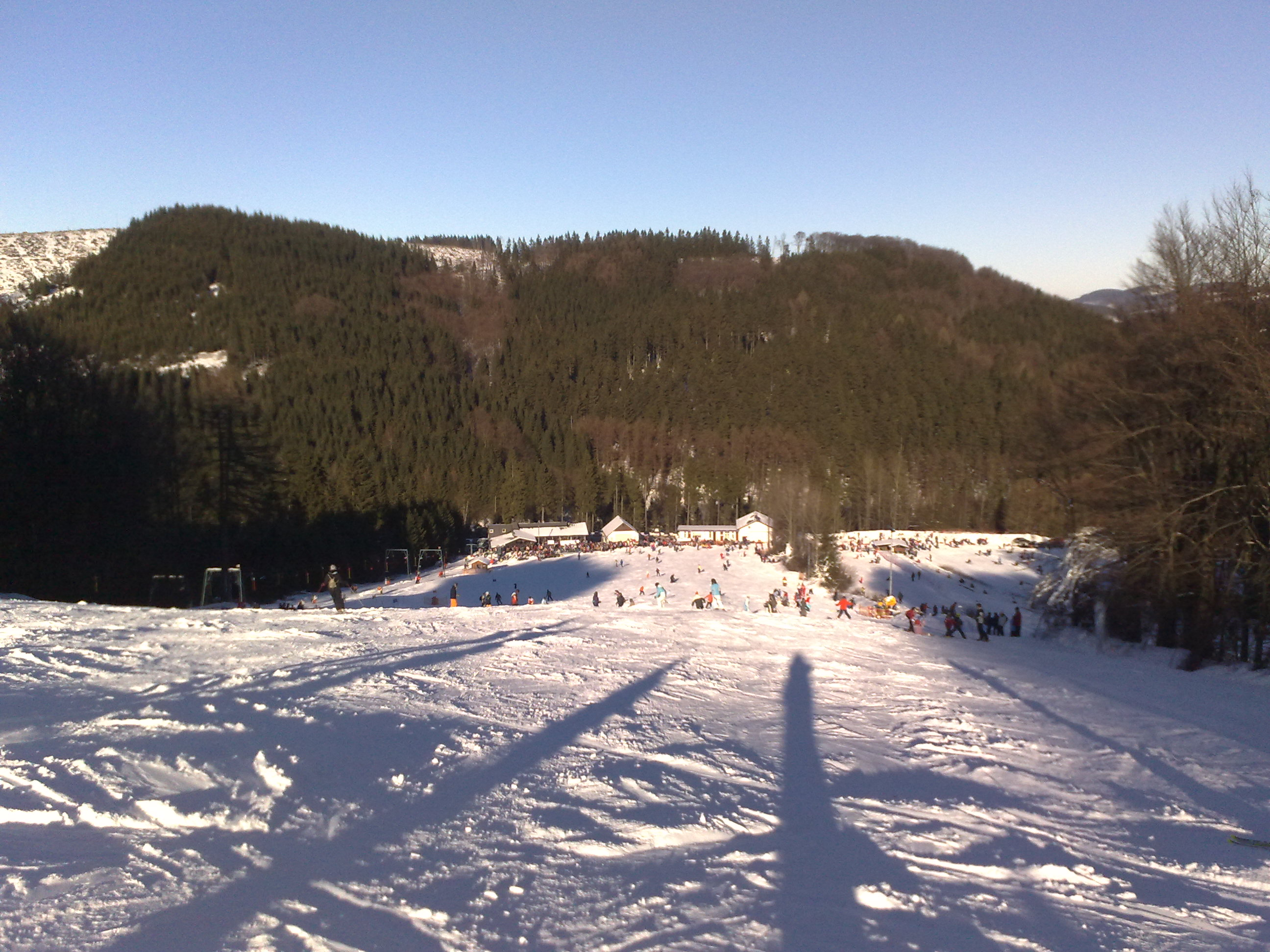 Die Hunau nahe Bödefeld. (Meschede / Schmallenberg)